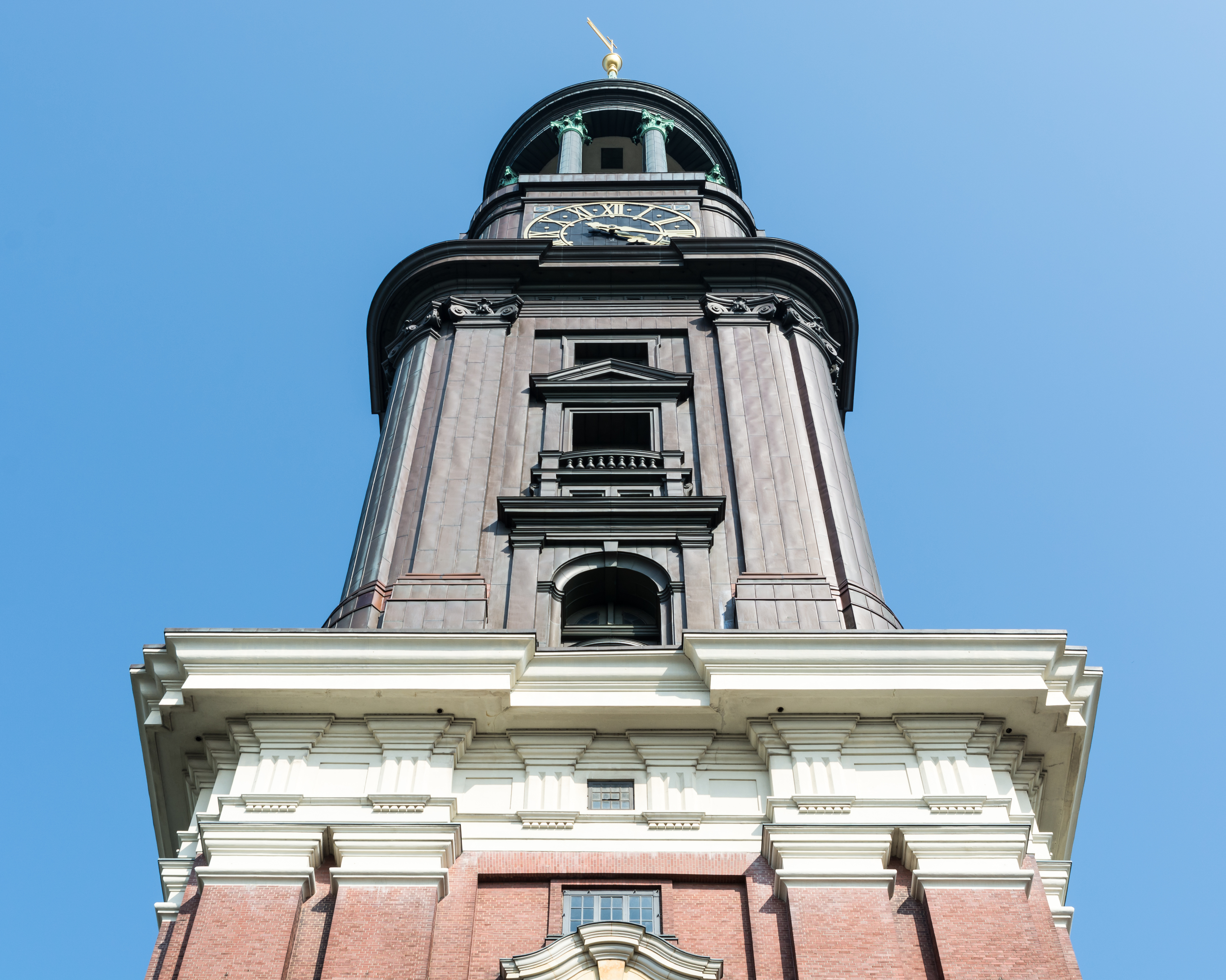 Turm der Hauptkirche St. Michaelis in Hamburg-Neustadt. This is a photograph of an architectural monument.